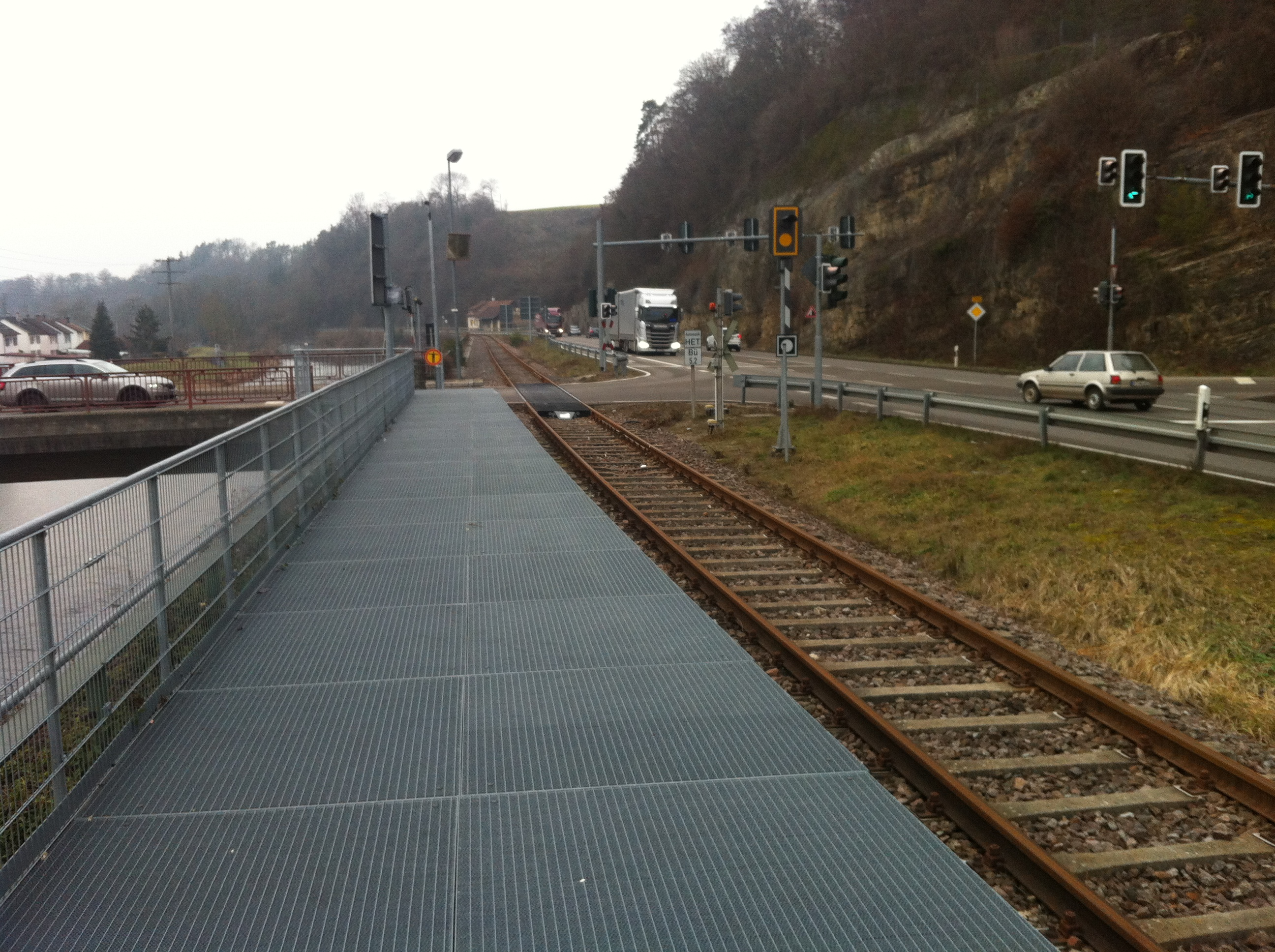 Wutachtalbahn, Bahnsteig Wutöschingen (2), Bahnbetriebe Blumberg. Landkreis Waldshut in Baden-Württemberg.